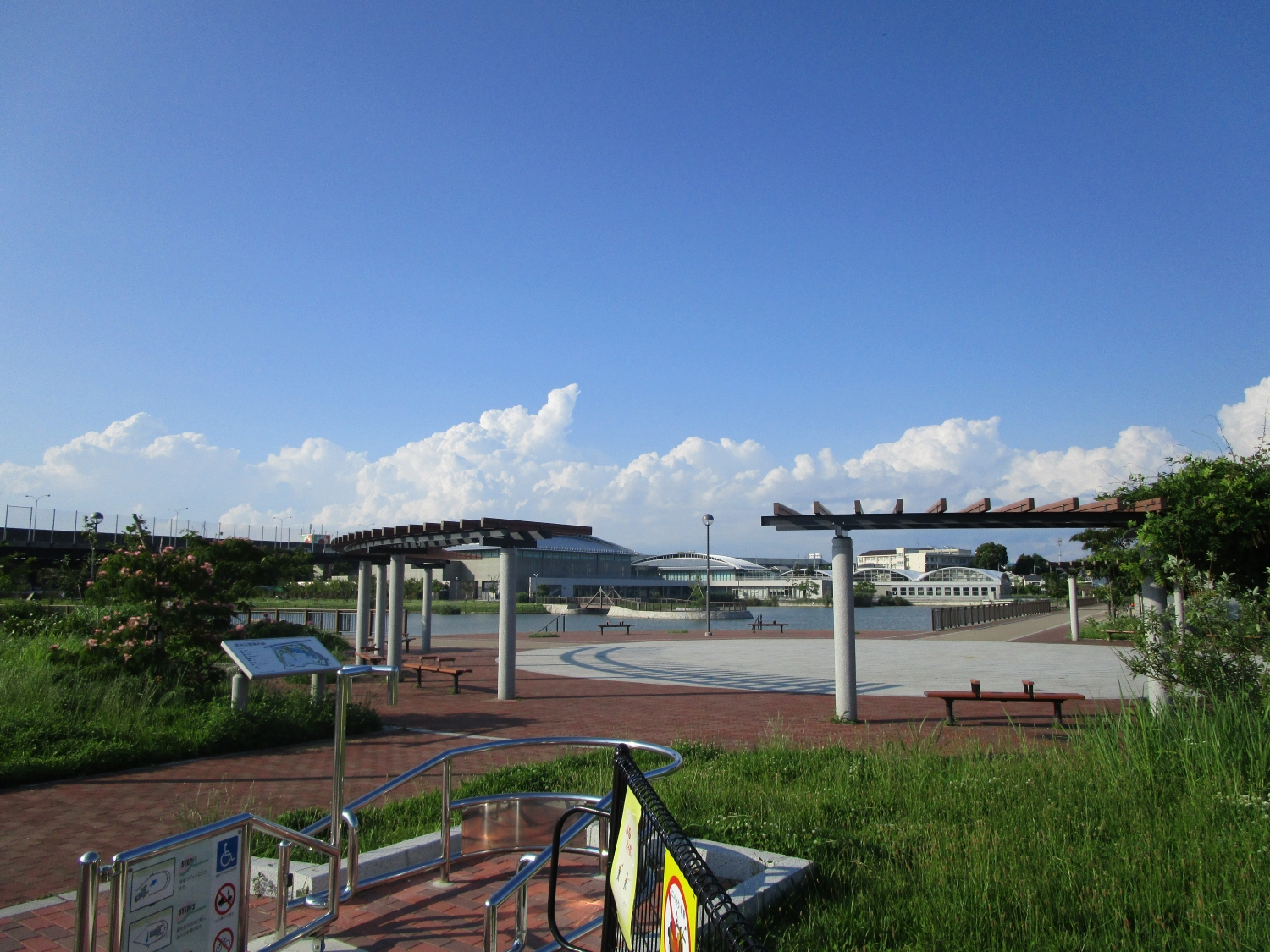 原池公園入口付近